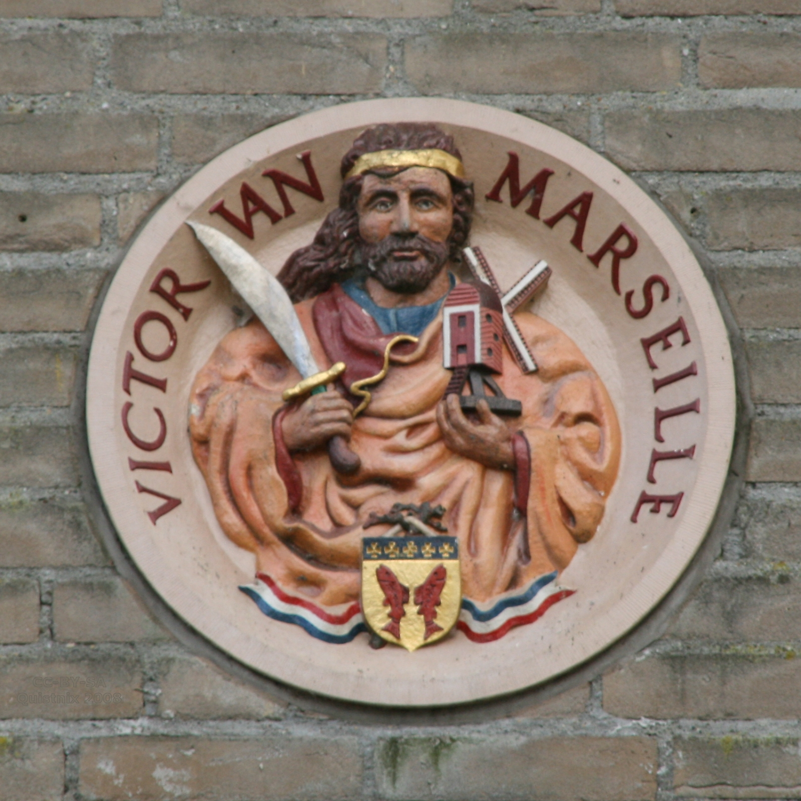 Woudrichem: Afbeelding van Victor van Marseille in molen Nooit Gedagt